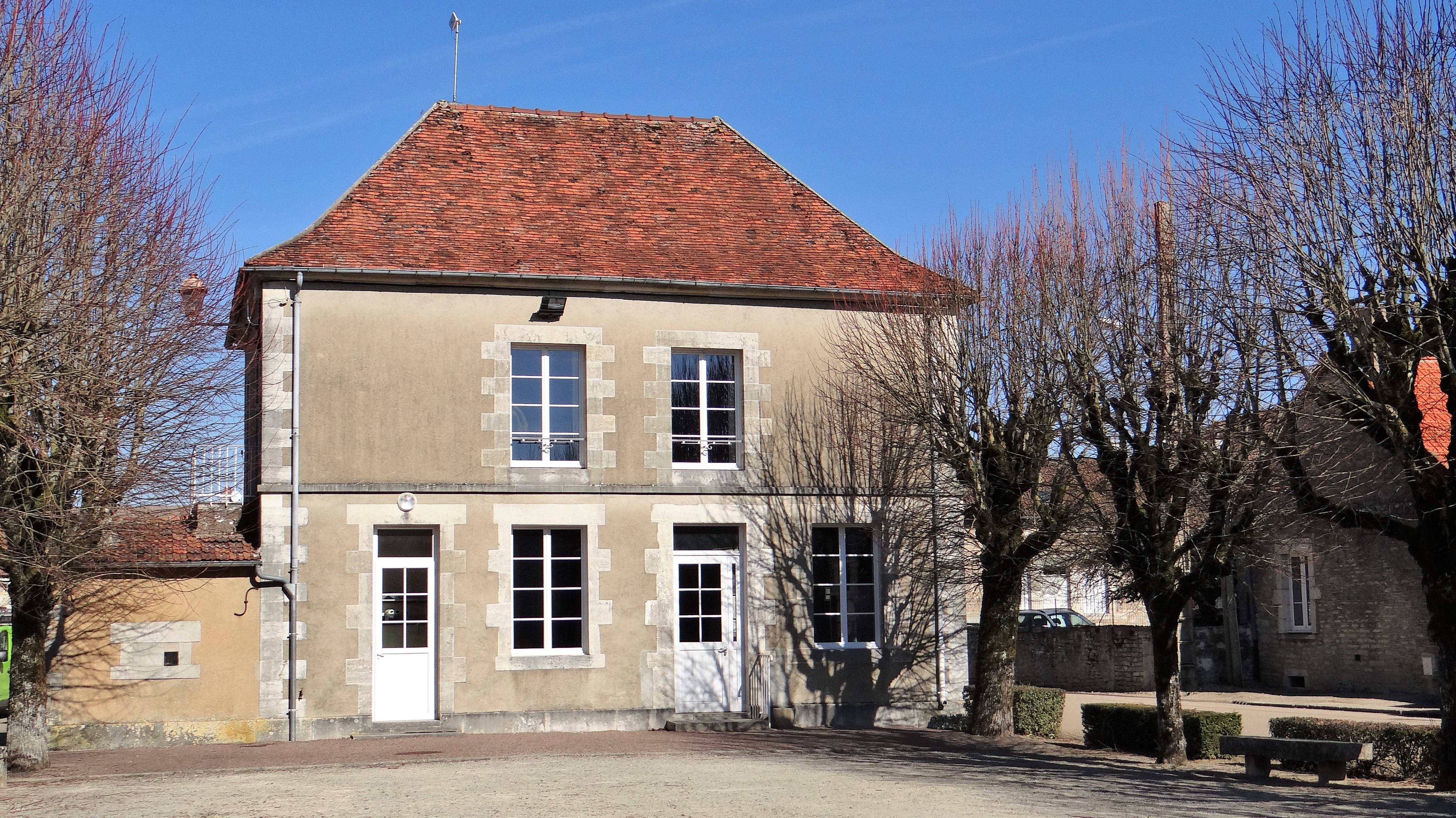 Mairie d'Annoux, côté cours, Yonne, Bourgogne